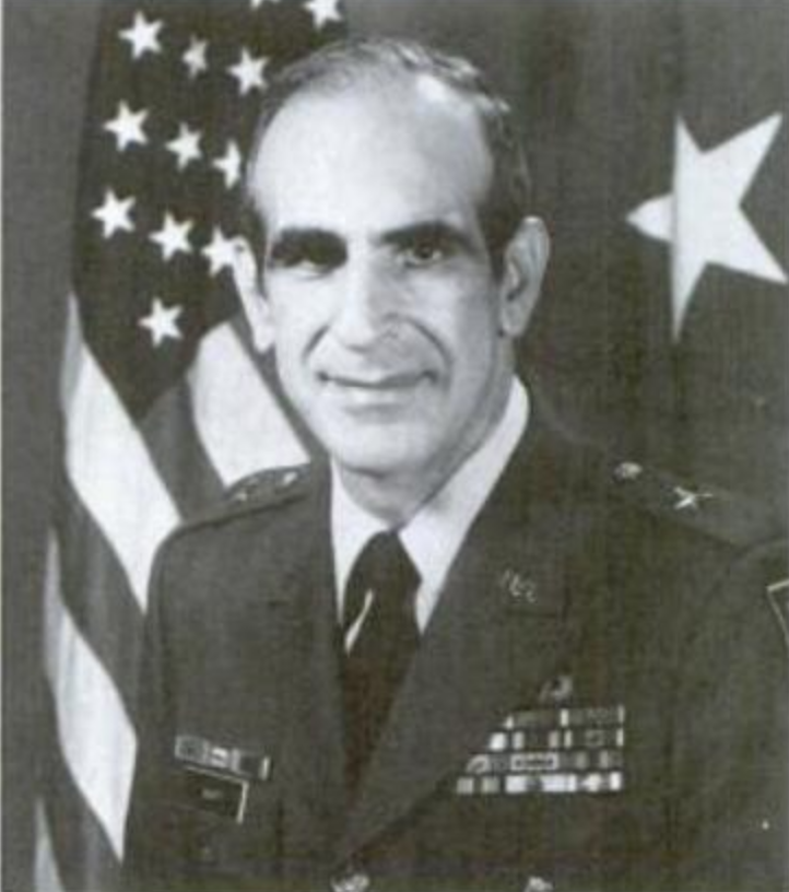 BG John J. Skaff